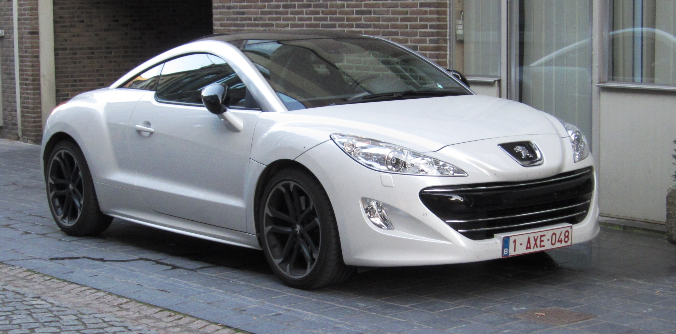 Peugeot RCZ a St Trond